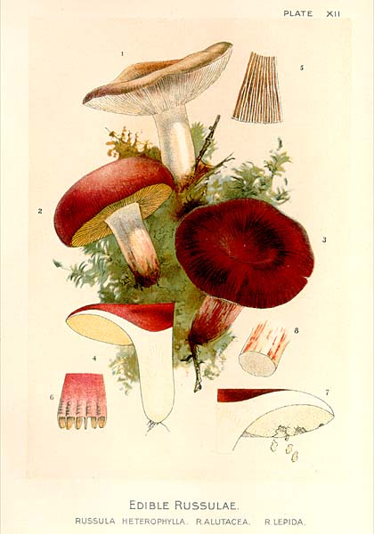 holubinka bukovka z